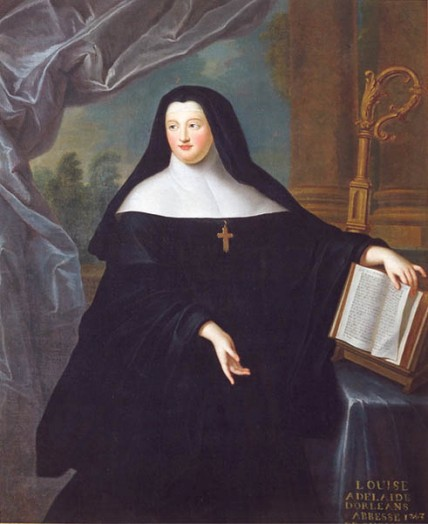 Portrait de Louise Adélaïde d’Orléans, Abbesse de Chelles